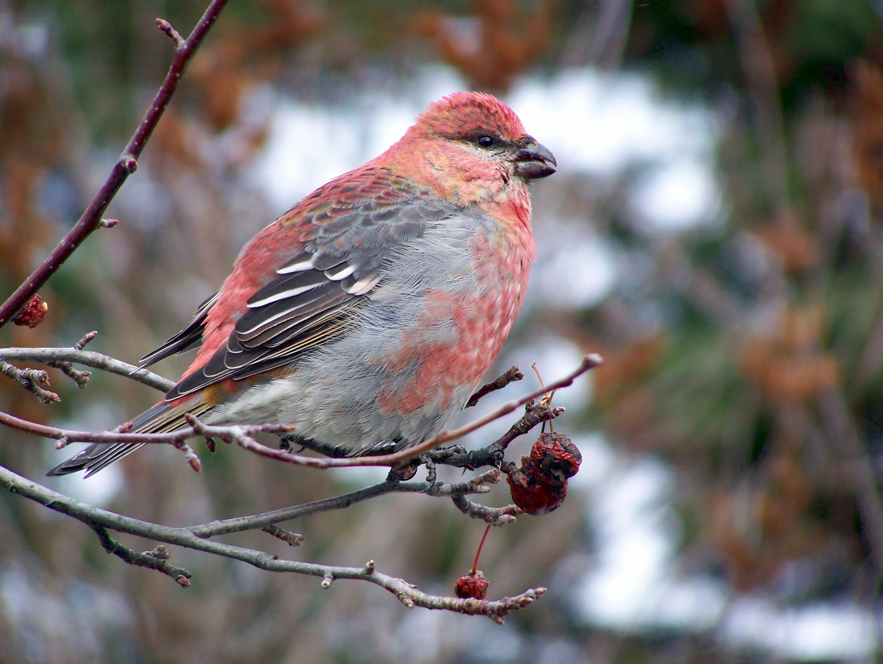 Pine Grosbeak (Pinicola enucleator)